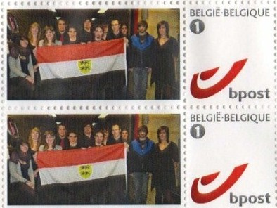 Марки виртуального государства Фландренсис